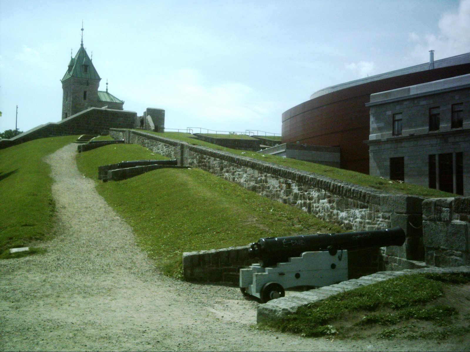 Au dessus des fortifications de Québec, près du Palais Montcalm